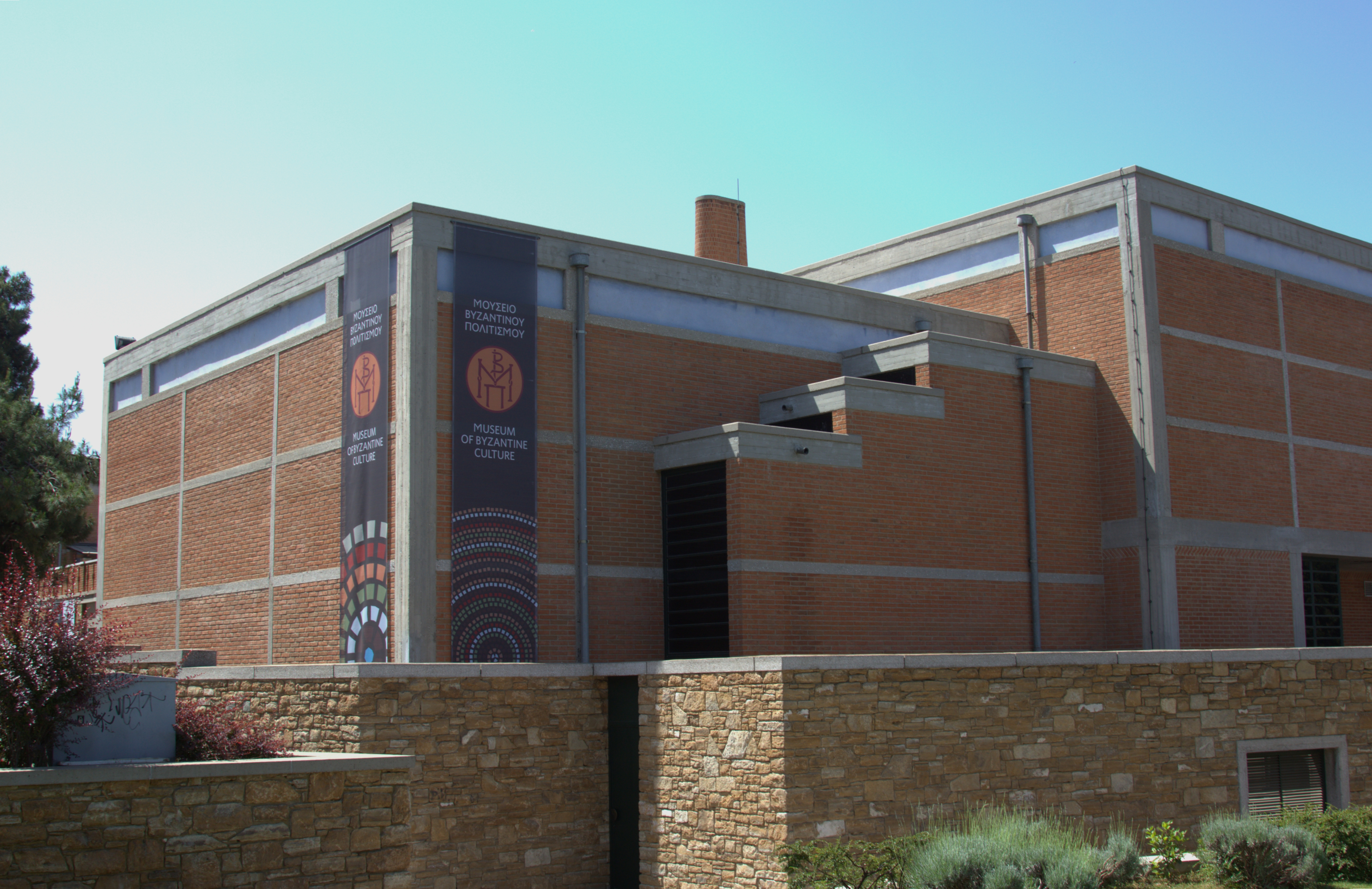 Μουσείο Βυζαντινού Πολιτισμού, Θεσσαλονίκη.